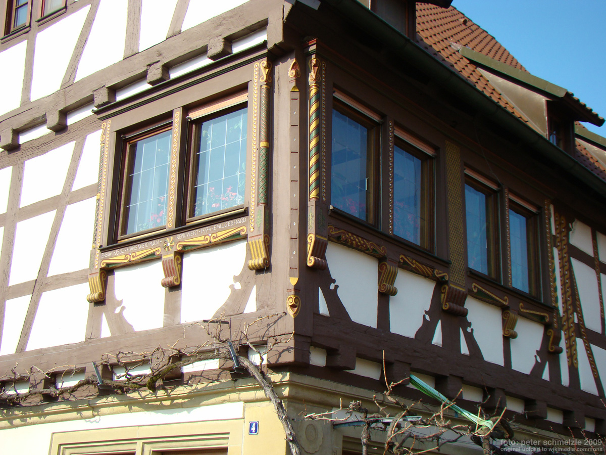 Historisches Fachwerkhaus in Eppingen-Mühlbach